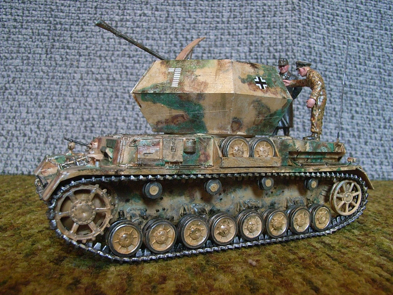 Flakpanzer IV Ostwind (Modell)